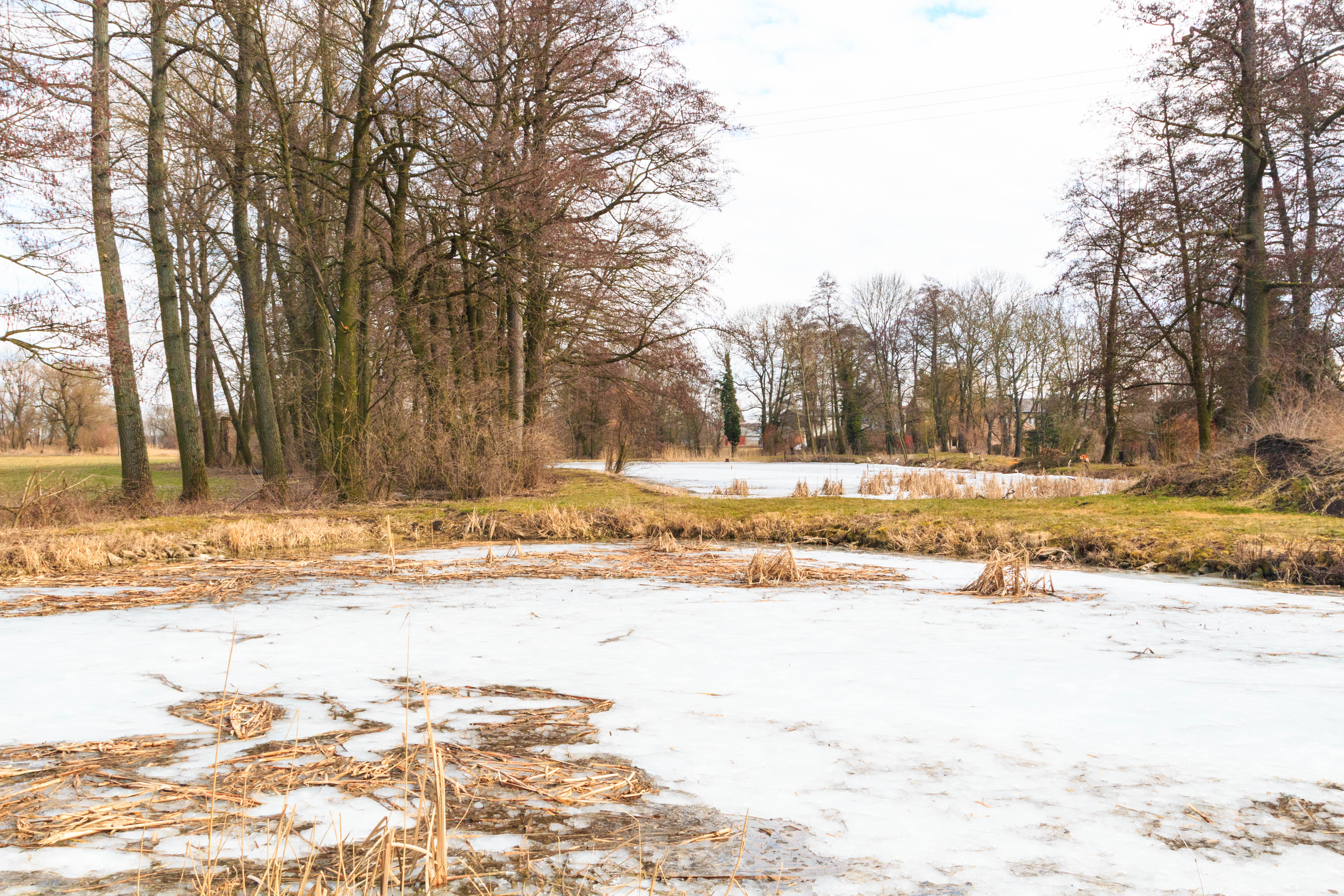 rybníčky u mlýna v Kratonohách Project: Vodstvo.